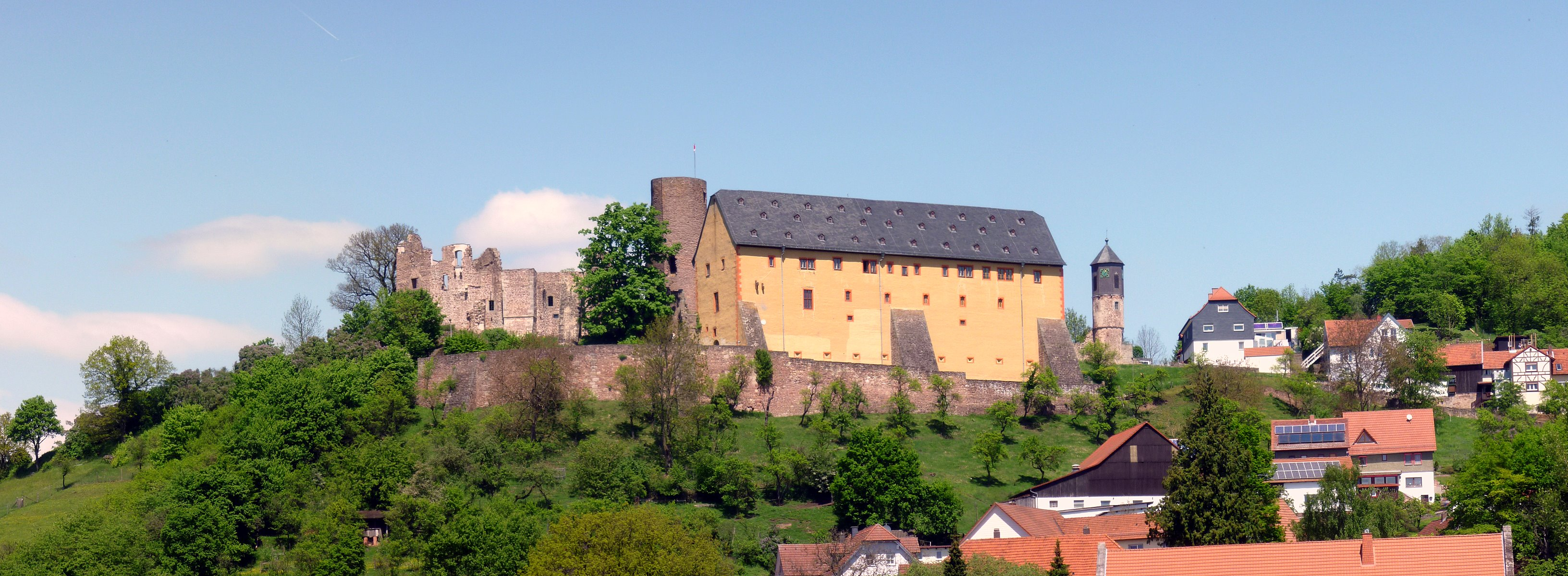 Burg Schwarzenfels